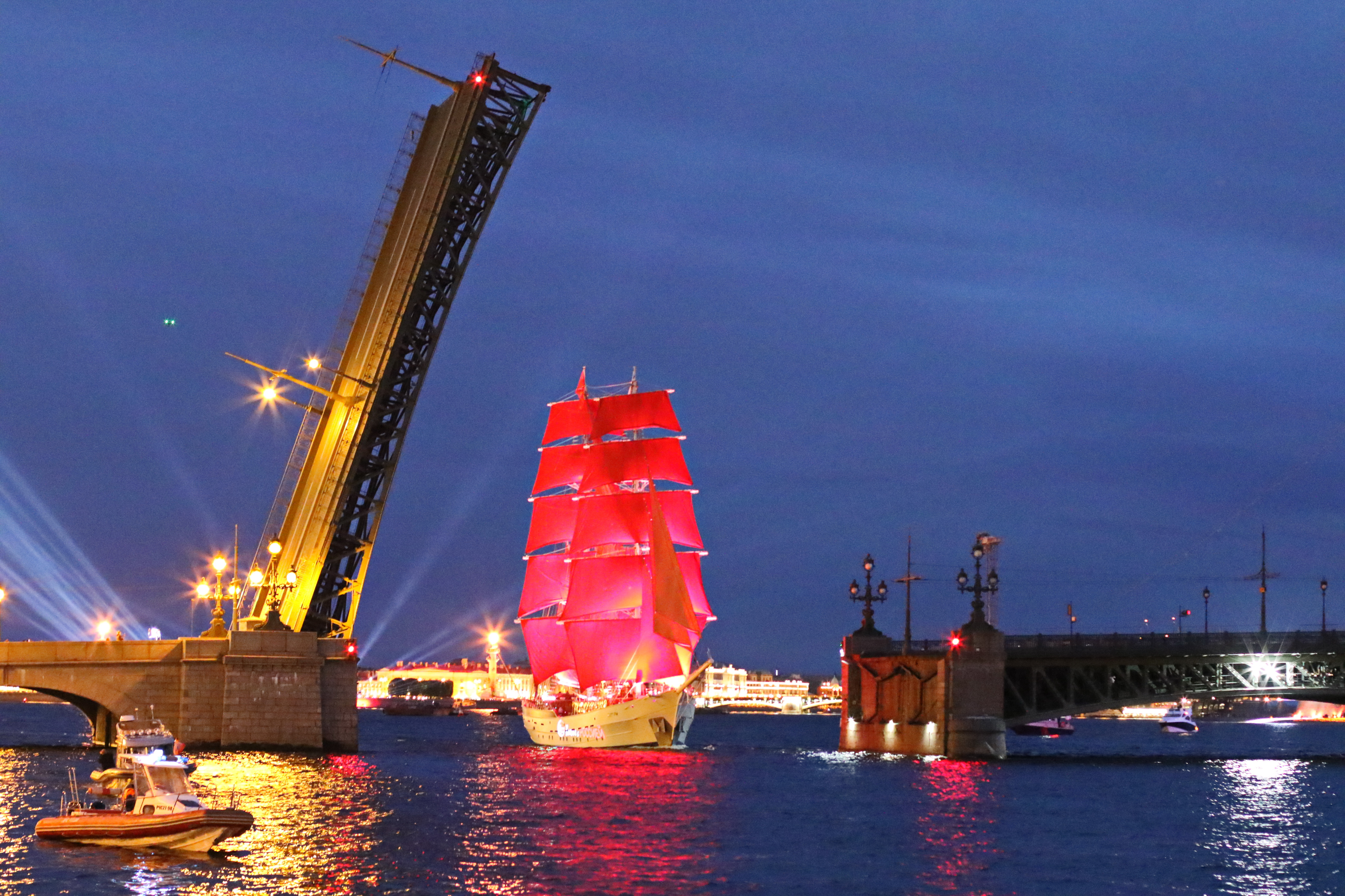 Белая ночь над Невой . Праздник "Алые Паруса 2019". Парусное судно " Бриг Россия" в Санкт-Петербурге. Открытый пролёт Троицкого моста.